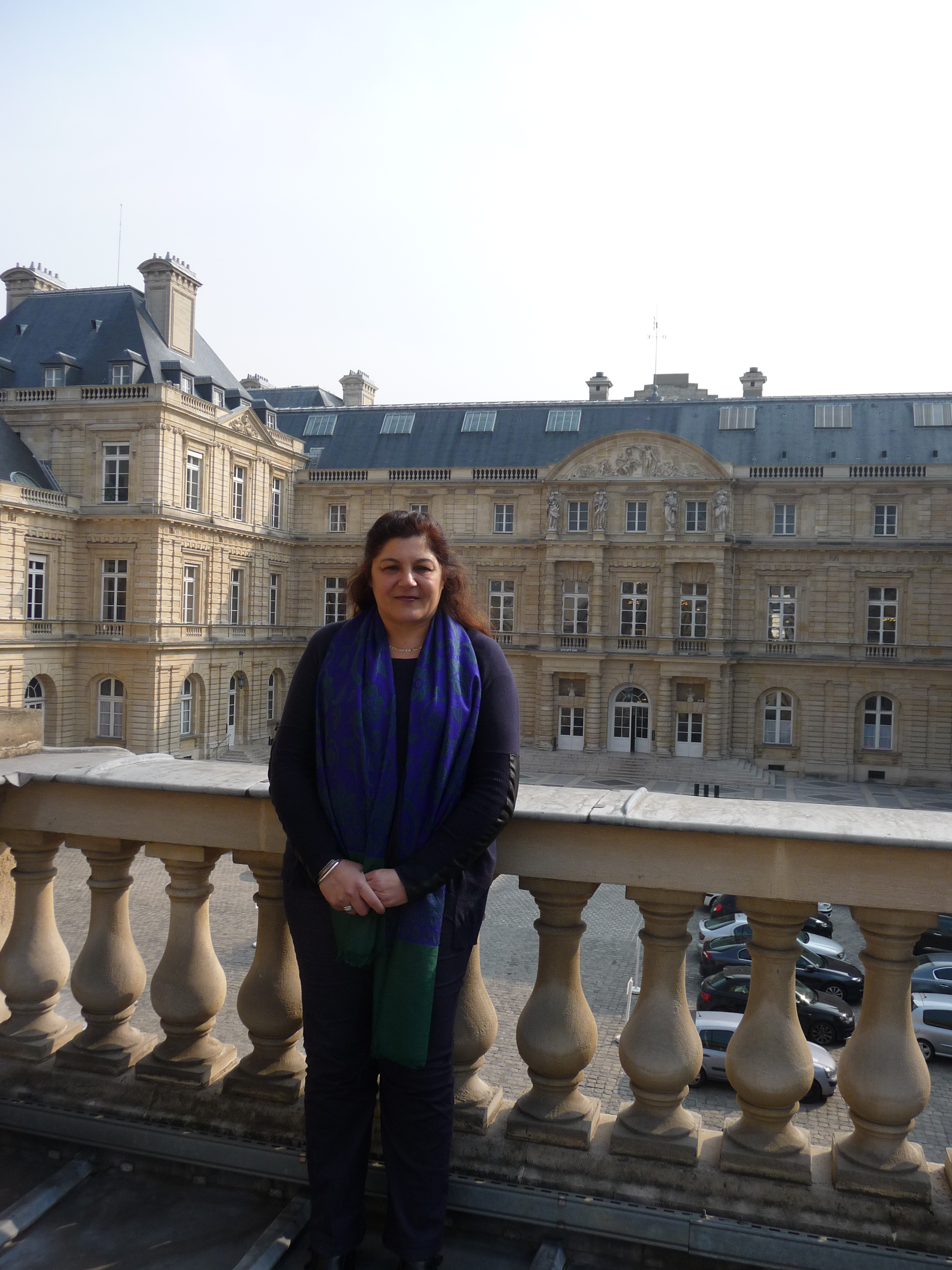 Kalliopi Ango Ela, sénatrice, devant le Palais du Luxembourg